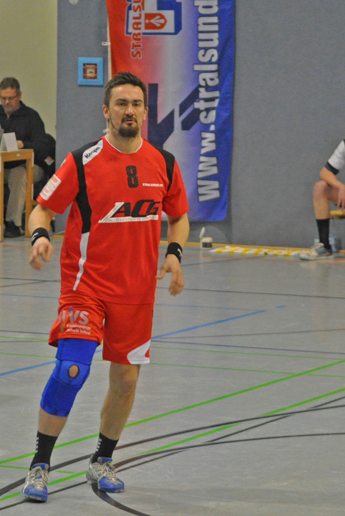 Bild aufgenommen beim Spiel in der 3. Liga (DHB) zwischen dem Stralsunder HV und dem HSV Insel Usedom am 23. März 2013 in der Stralsunder Vogelsanghalle. Das Speil endete 30:29 für den Stralsunder HV.